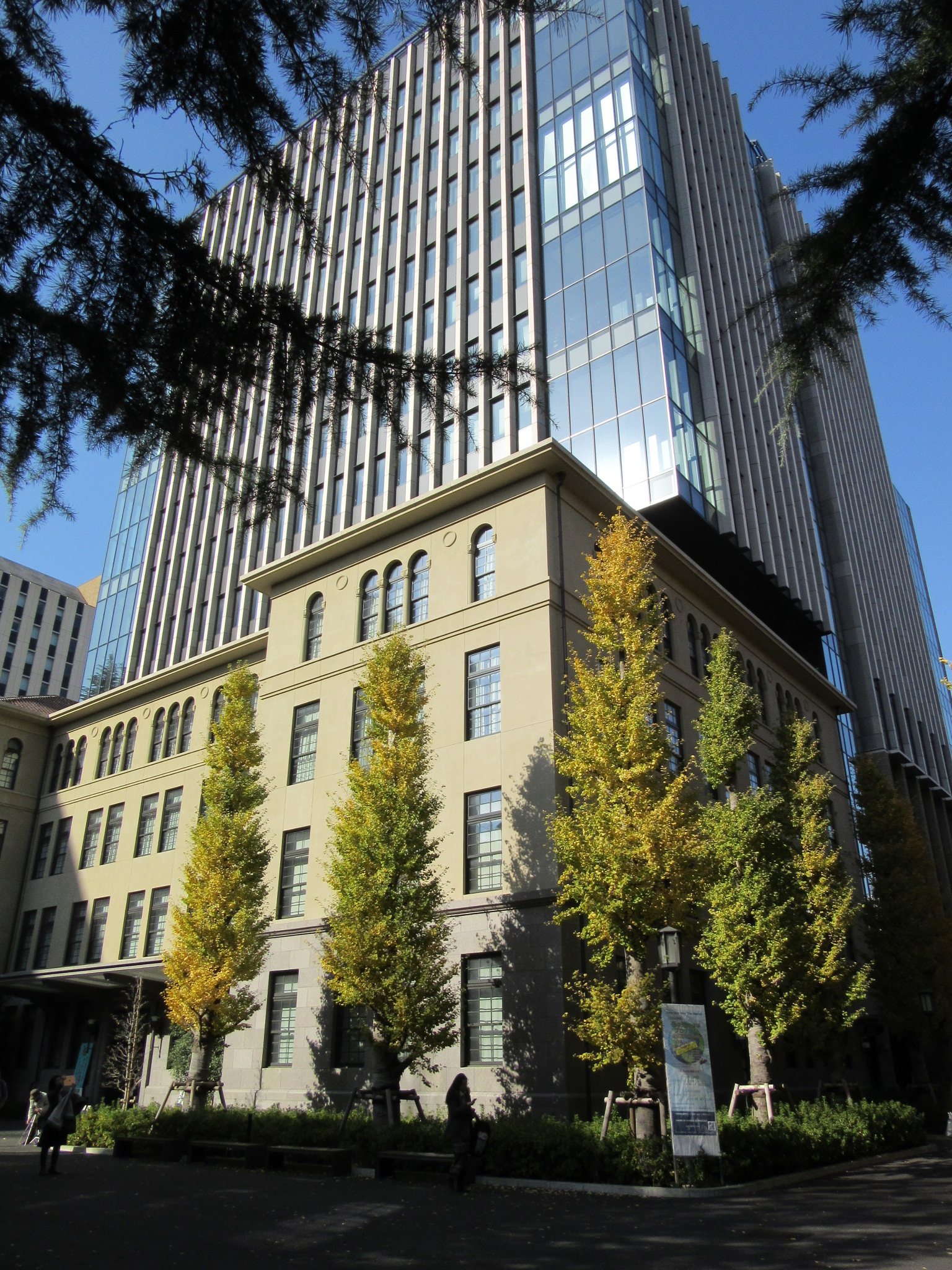 早稲田大学政治経済学部新三号館